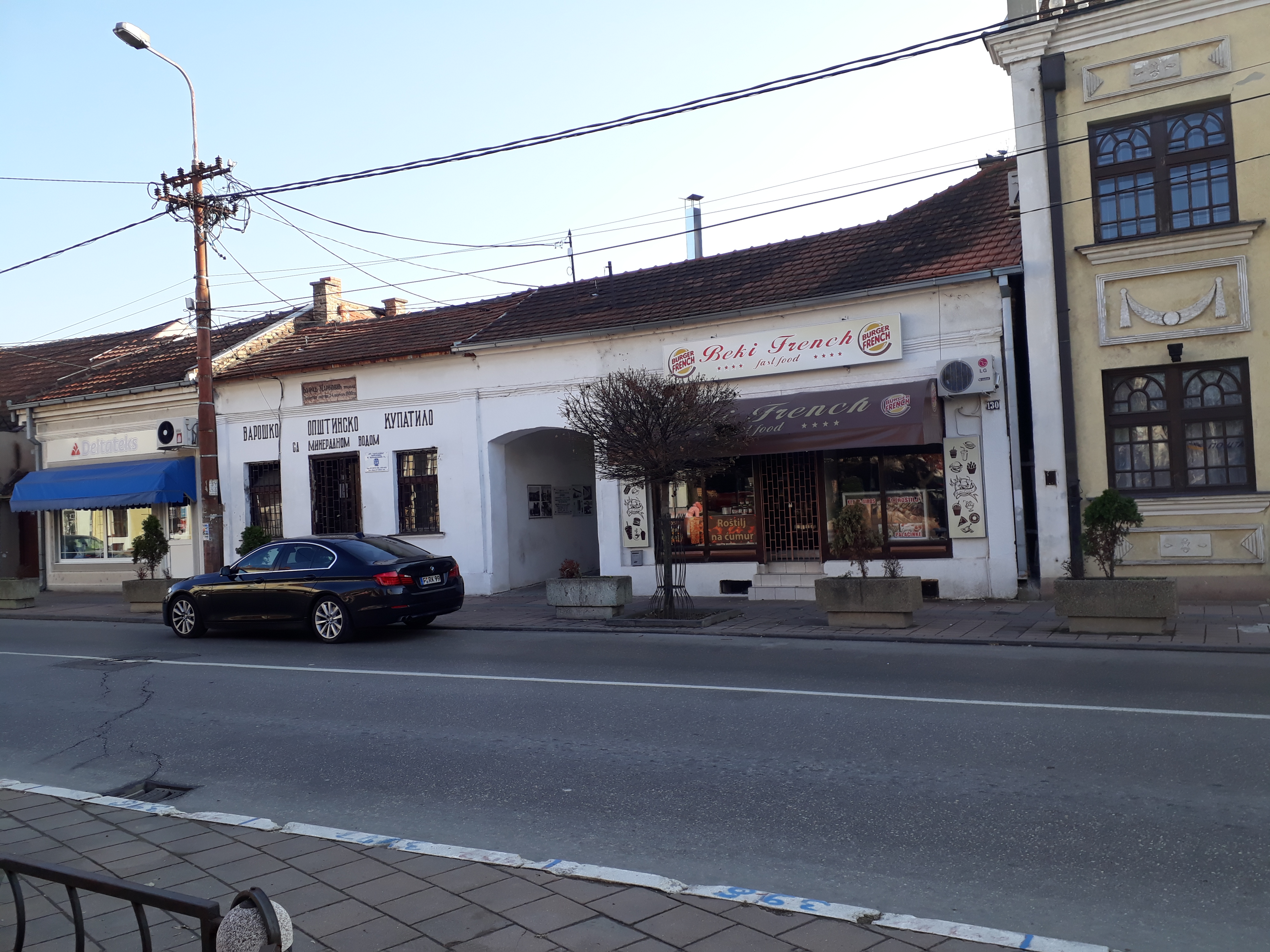 Obrenovačka banja -ulaz